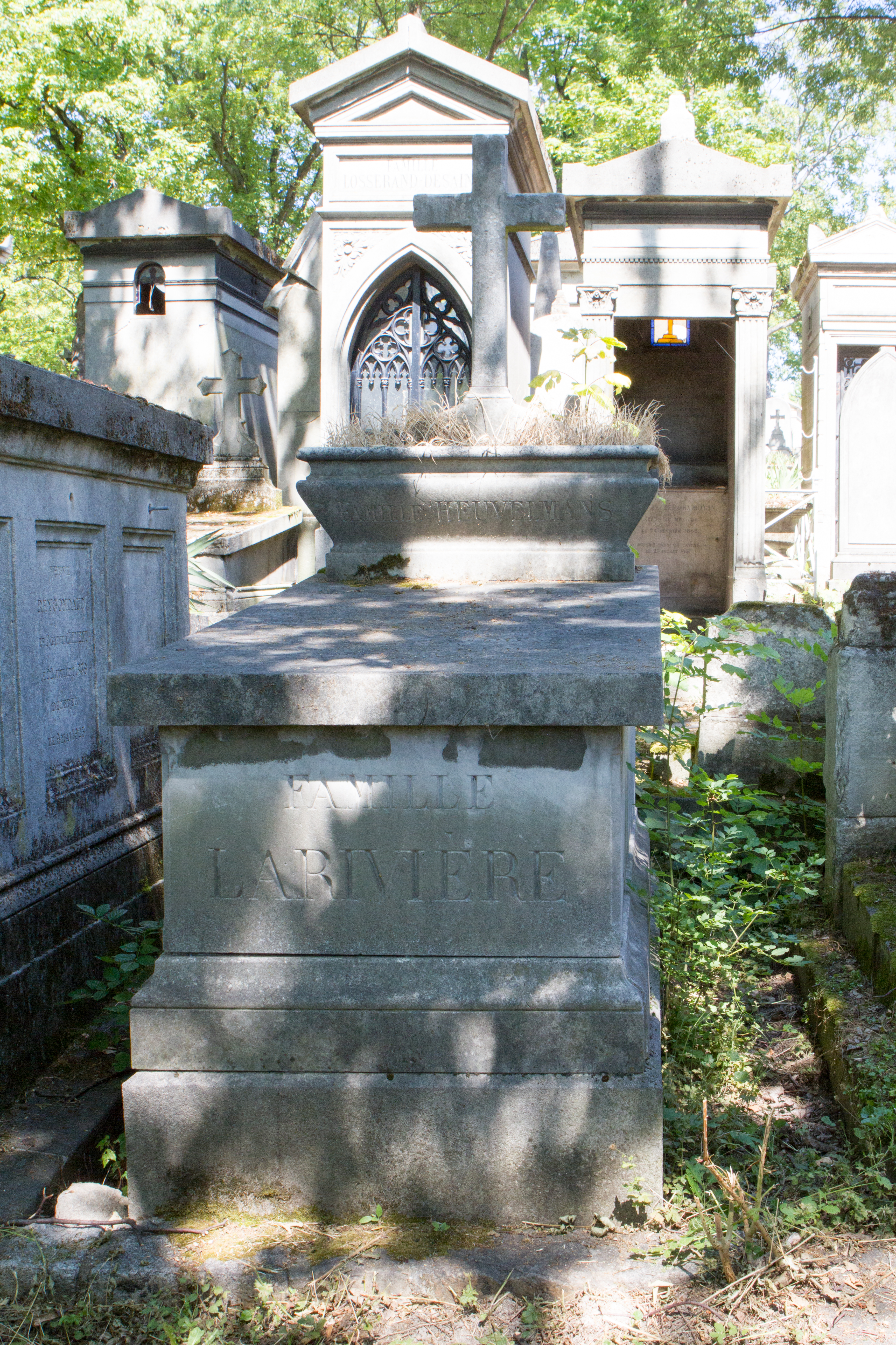 Sépulture de Lucienne Heuvelmans (1881-1944), sculptrice, peintre et illustratrice française. Elle fut en 1911 la première femme lauréate d'un premier grand prix de Rome.